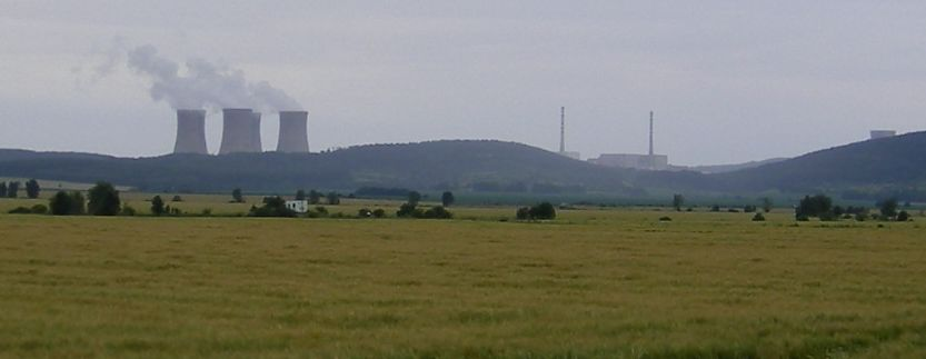 Mochovce